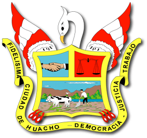 Escudo de la ciudad de Huacho y provincia de Huaura